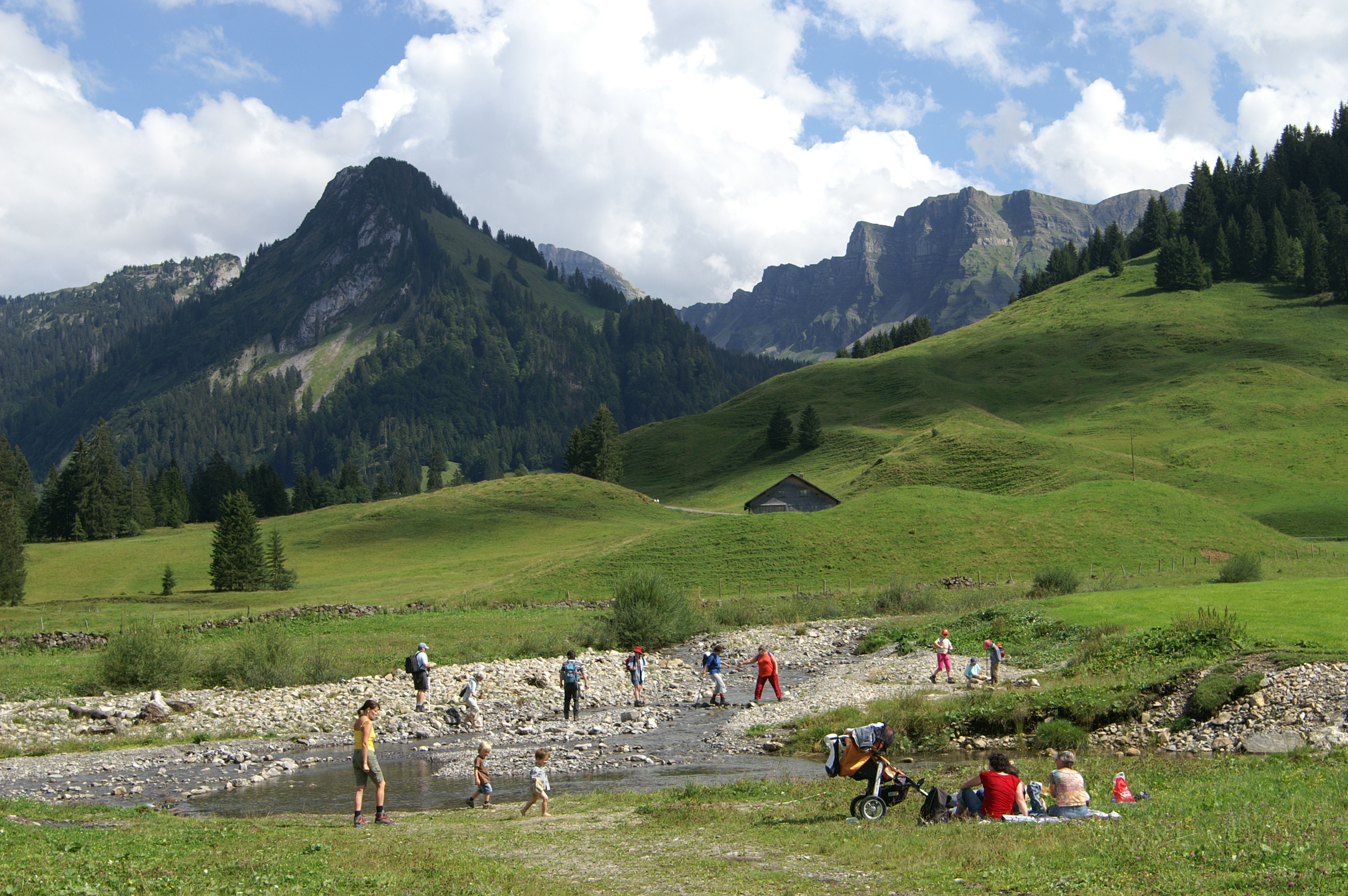 Vorsäss, Maisäss Schönenbach bei Bizau im Bregenzerwald im Vordergrund sie Subersach der Sevisschrofen 1659m, im Hintergrund Hehle Kopf 2058m und Pellinger Köpfle 1994m